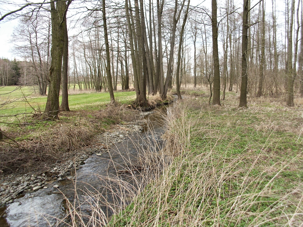 Beuthenbach